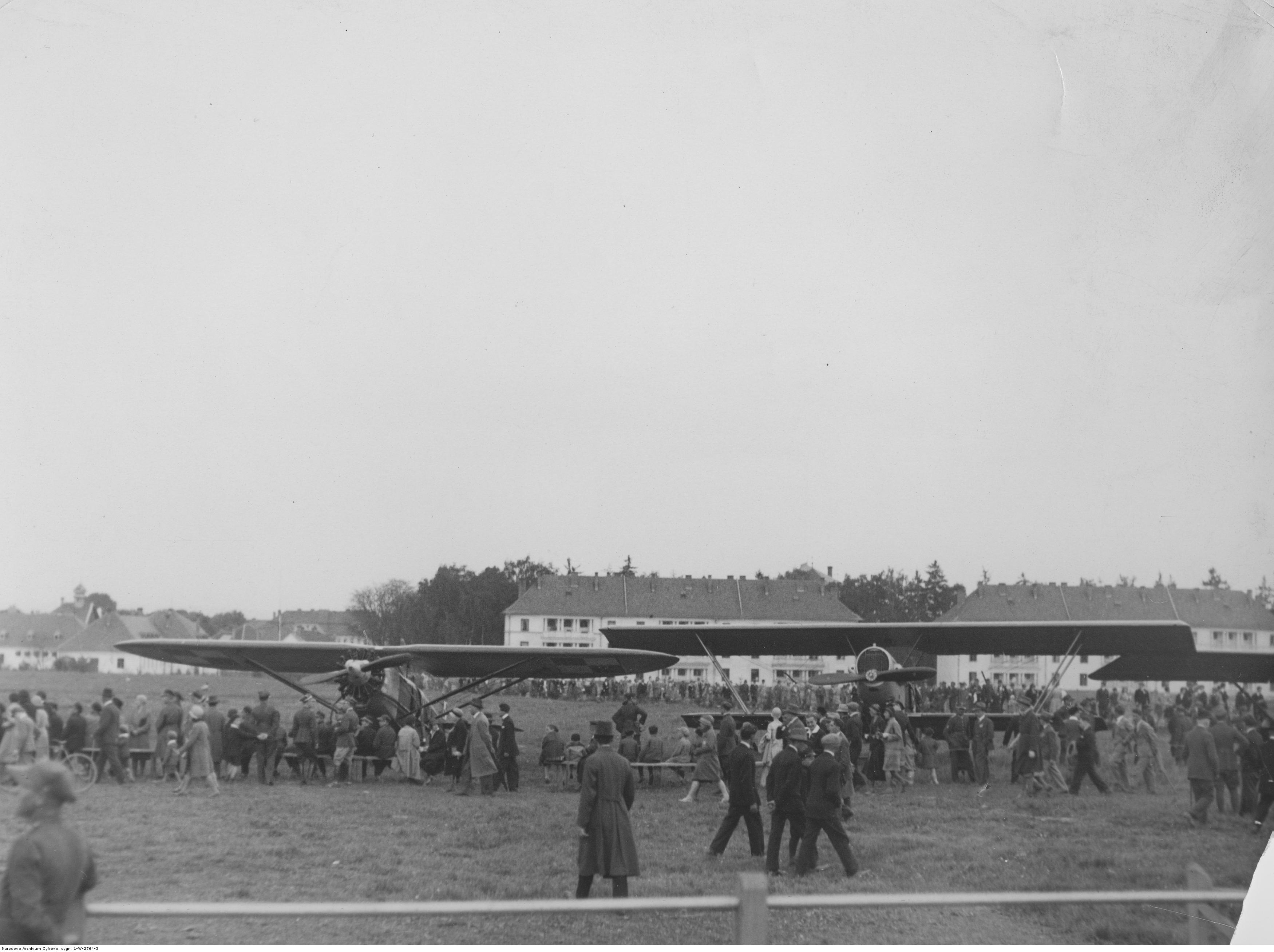 Publiczność ogląda stojące na lotnisku samoloty: Breguet 14 (z prawej) i Lublin R-X (z lewej) podczas Tygodnia Ligi Obrony Powietrznej i Przeciwgazowej w Krakowie.